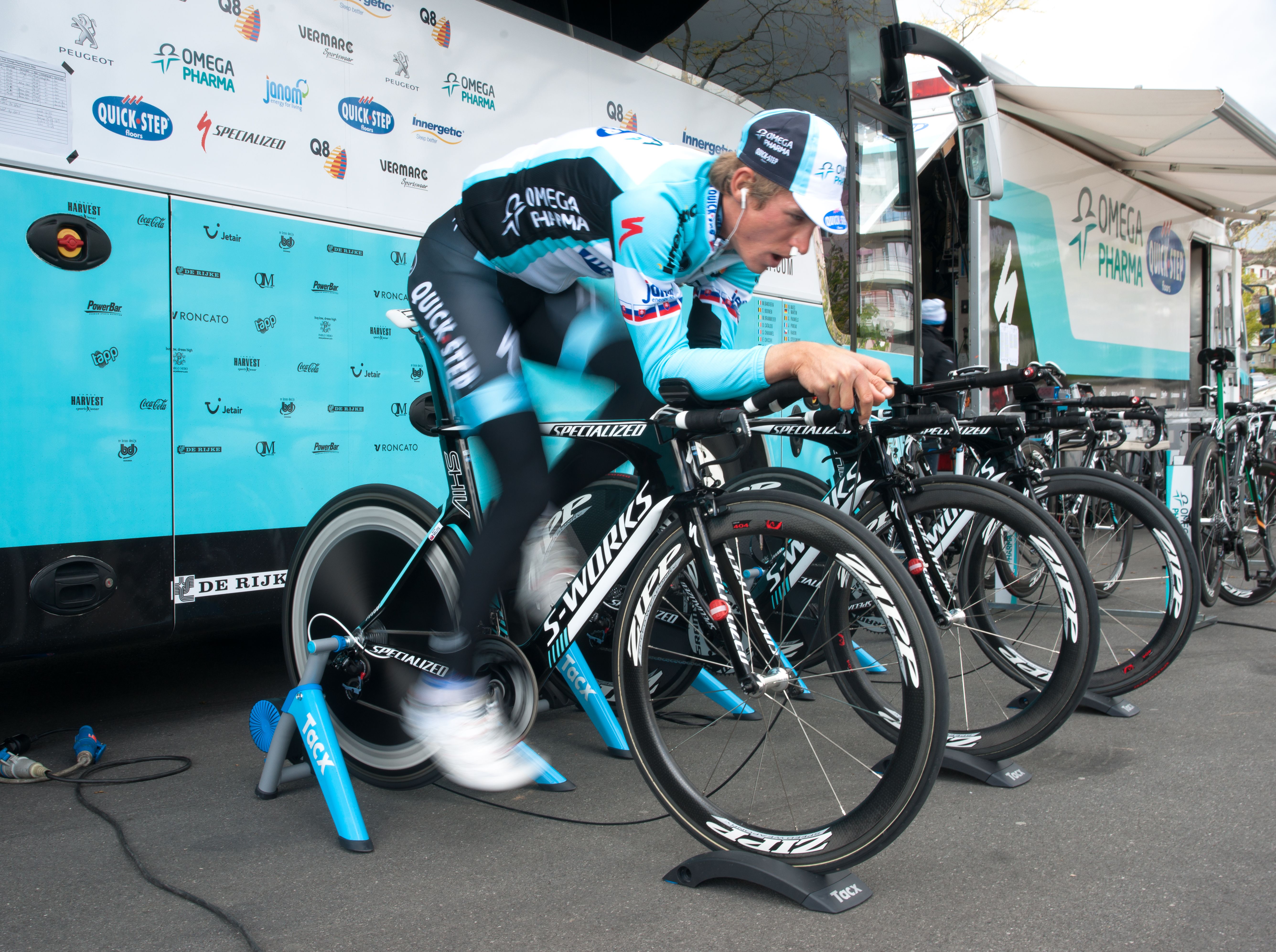 Martin Velits à l'échauffement du prologue du Tour de Romandie 2012.